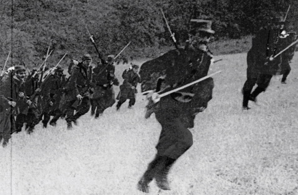 Truppe francesi all'attacco nel 1913. L'immagine è falsamente etichettata come scattata durante la prima battaglia della Marna